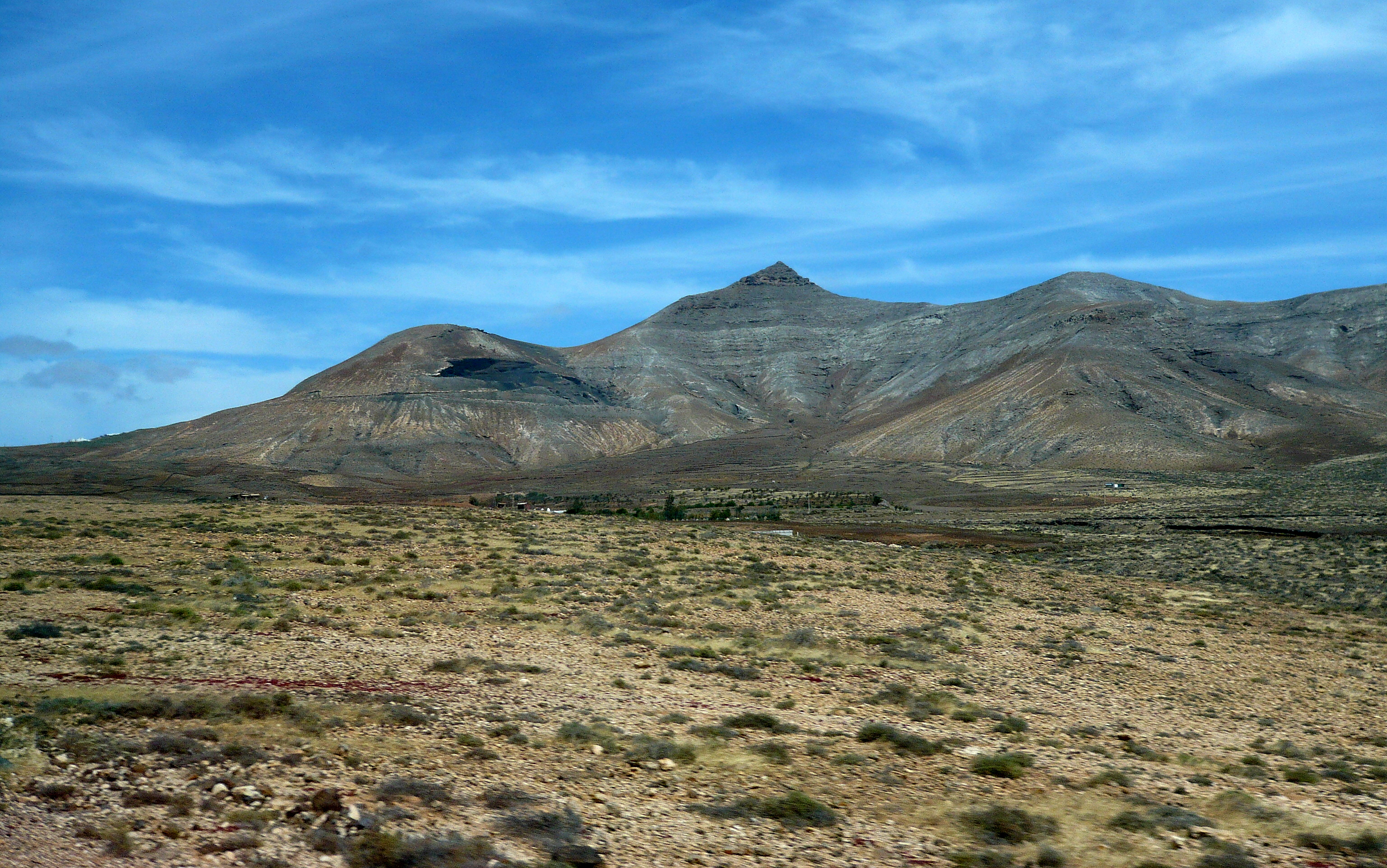 Fuerteventura